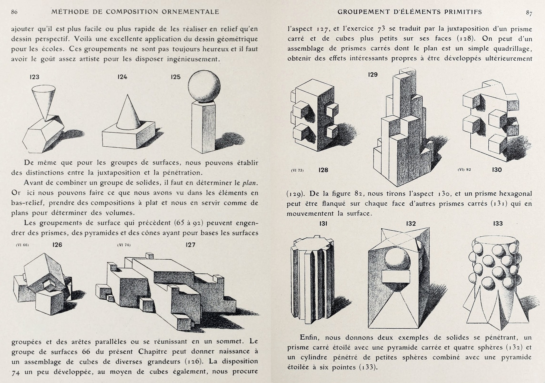 Illustrations and text from Eugène Grasset, 1905, Méthode de Composition Ornementale, Éléments Rectilignes, Groupement d'Éléments Primitifs (pp. 86, 87)